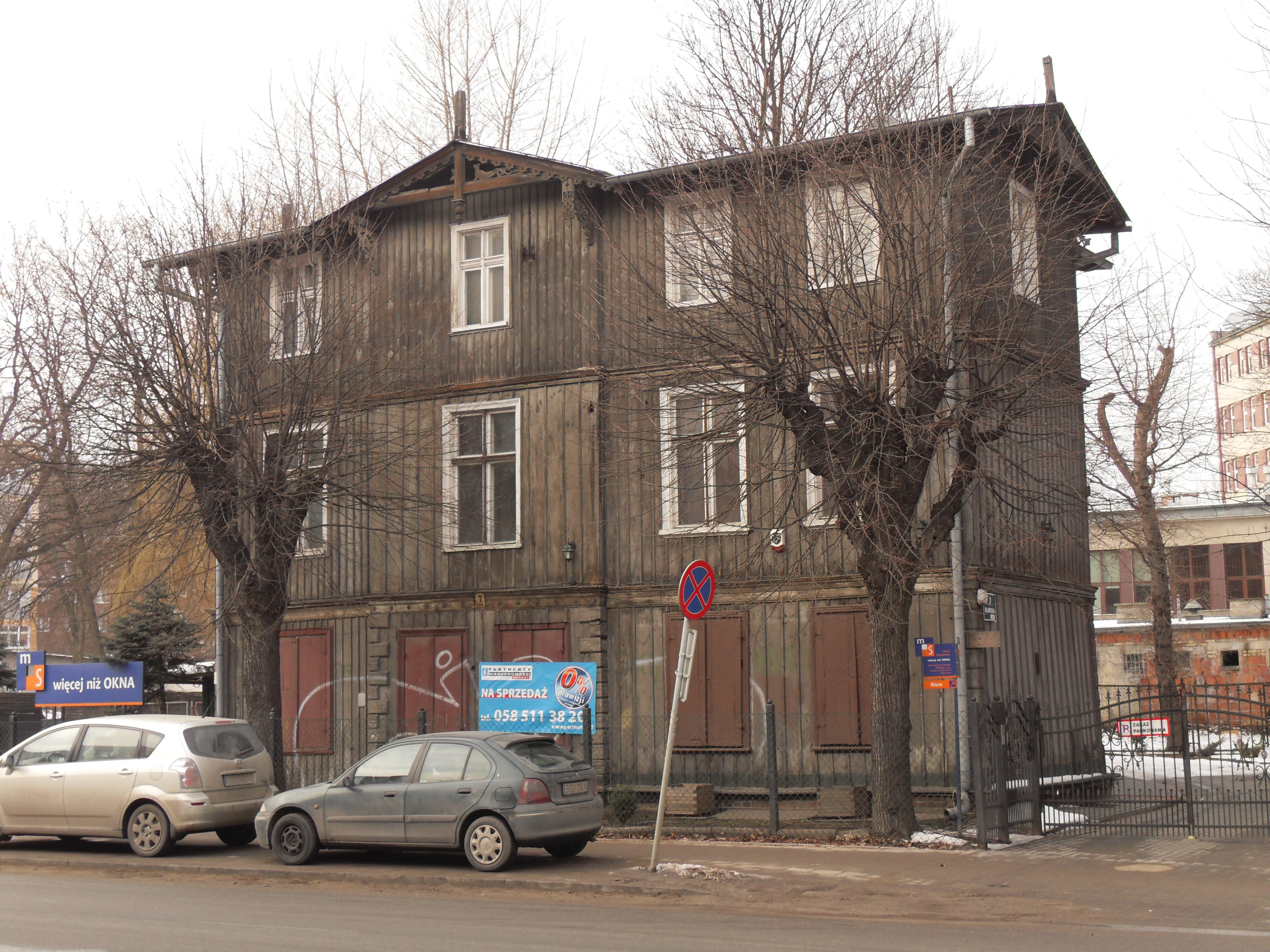 Gdańsk Siedlce, ul. Kartuska 7. (zabytek nr rejestr. 1287)